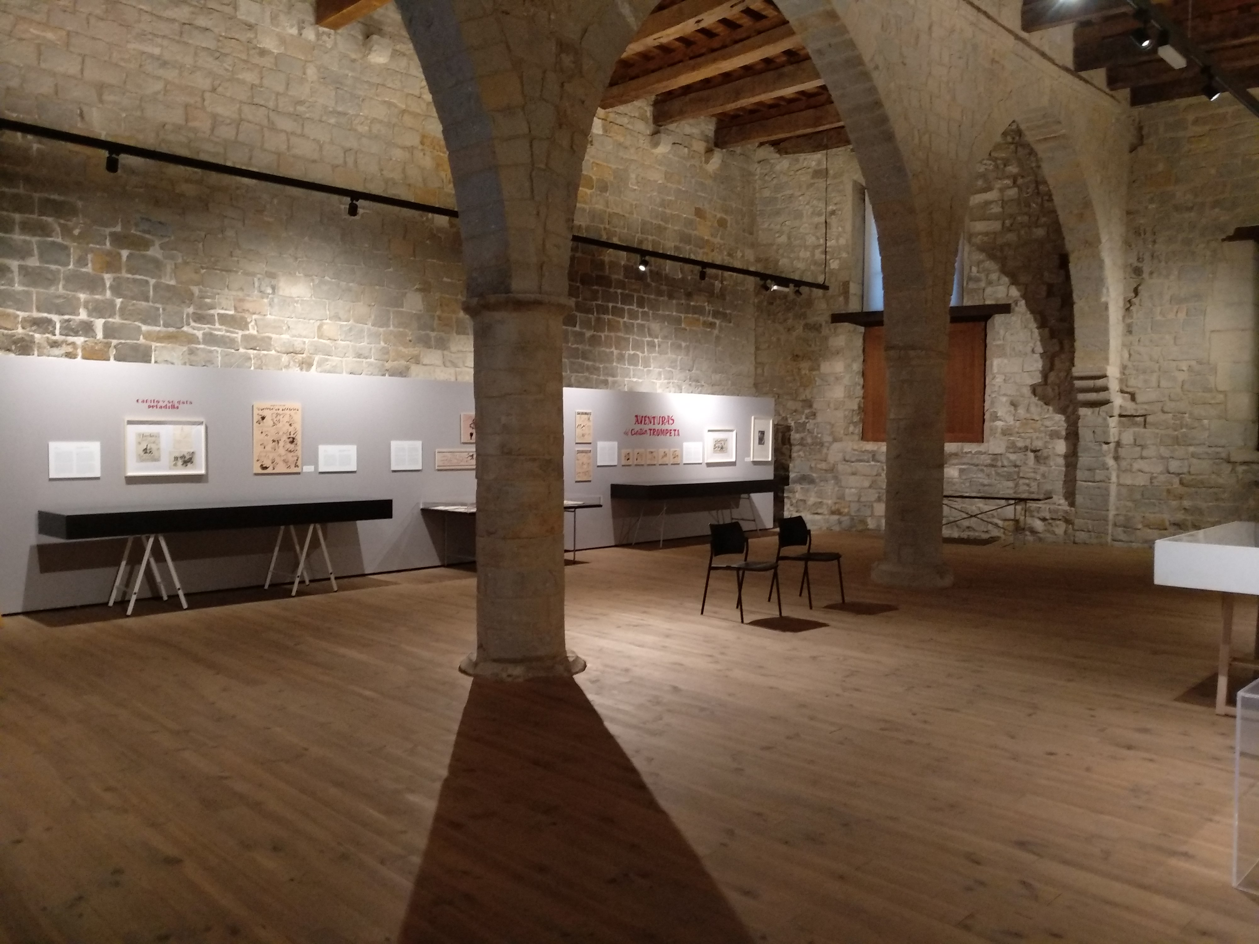 Palacio del Condestable de Pamplona (Sala Gótica)